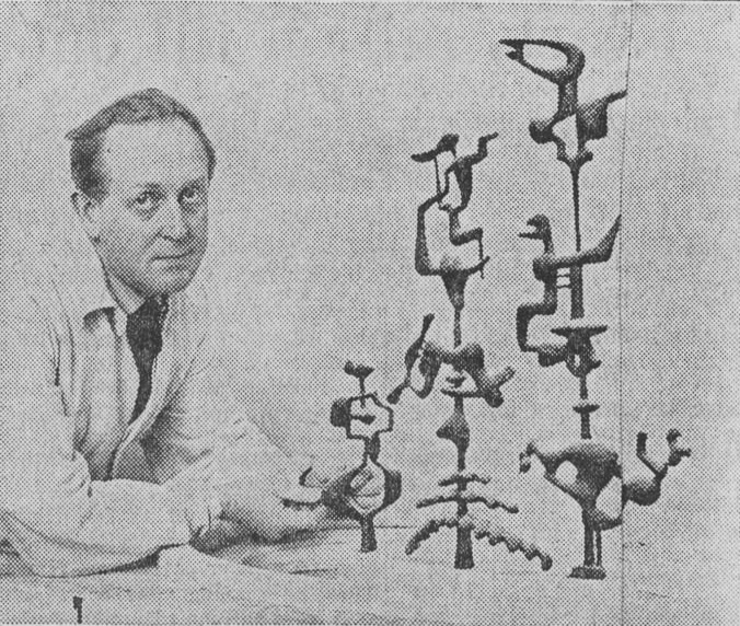 Per-Erik Willö med modell av Vänerskutan